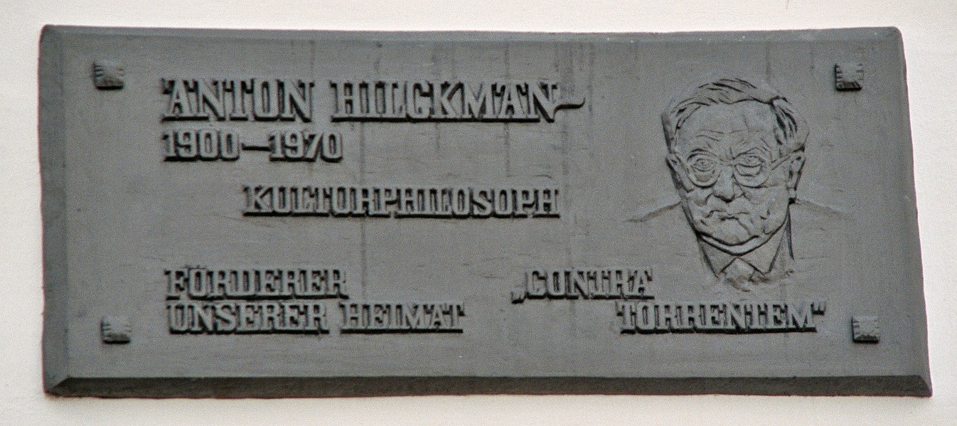 Gedenktafel für Anton Hilckman an seinem Geburtshaus (heute Heimathaus) in Bevergern, Nordrhein-Westfalen, Deutschland. Die Aufschrift lautet: Anton Hilckman ~ 1900-1970; Kulturphilosoph; Förderer unserer Heimat; „Contra torrentem“ [lat.: „Gegen den Strom“].